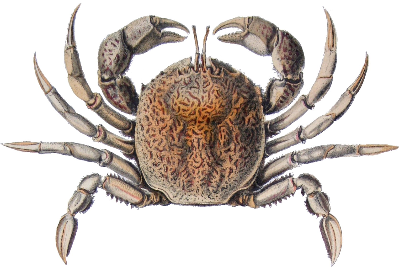 Bellia picta Edw. = Bellia picta H. Milne Edwards, 1848